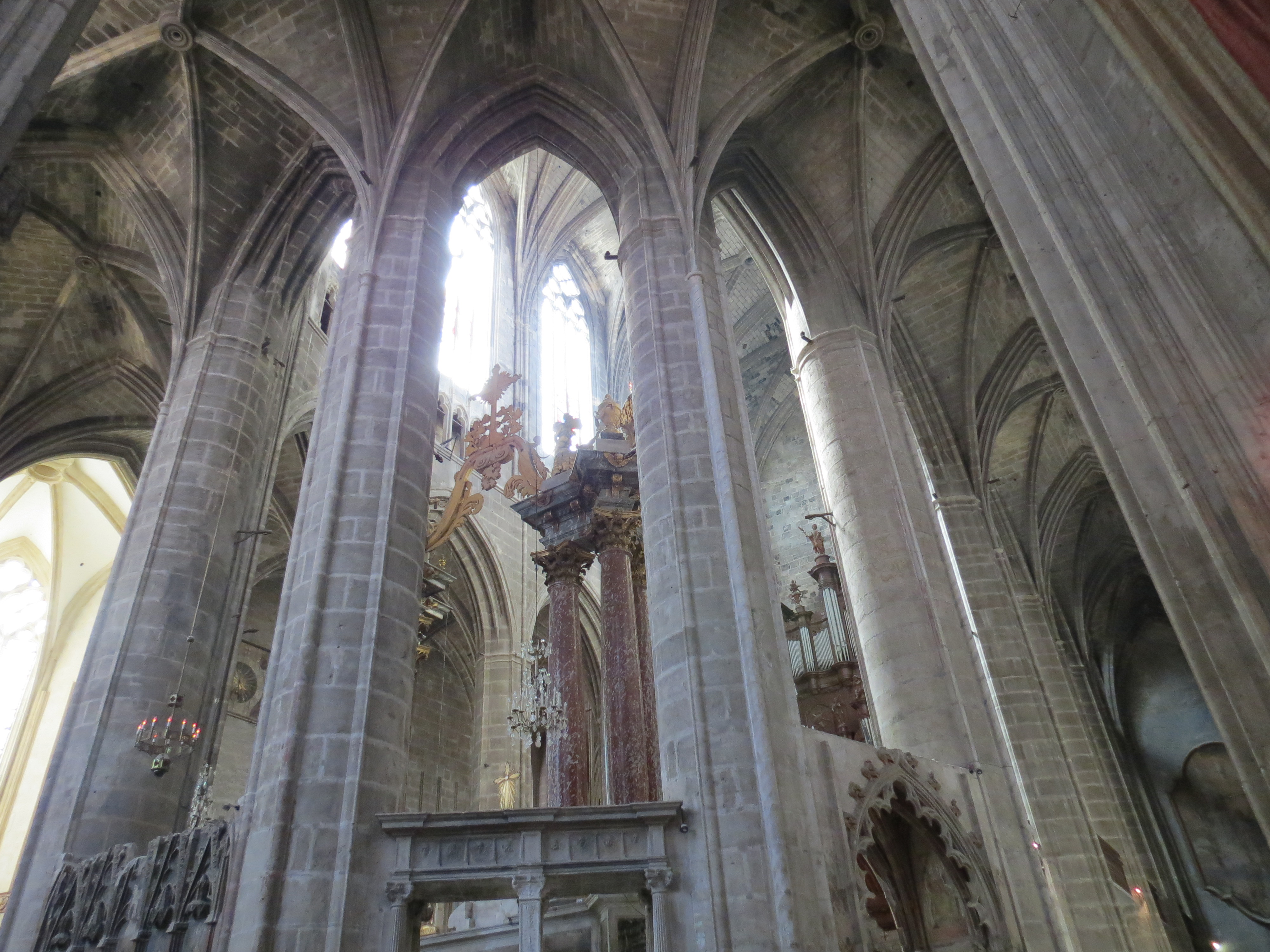 Cathédrale Saint-Just-et-Saint-Pasteur, Narbonne, Aude, Languedoc-Roussillon.